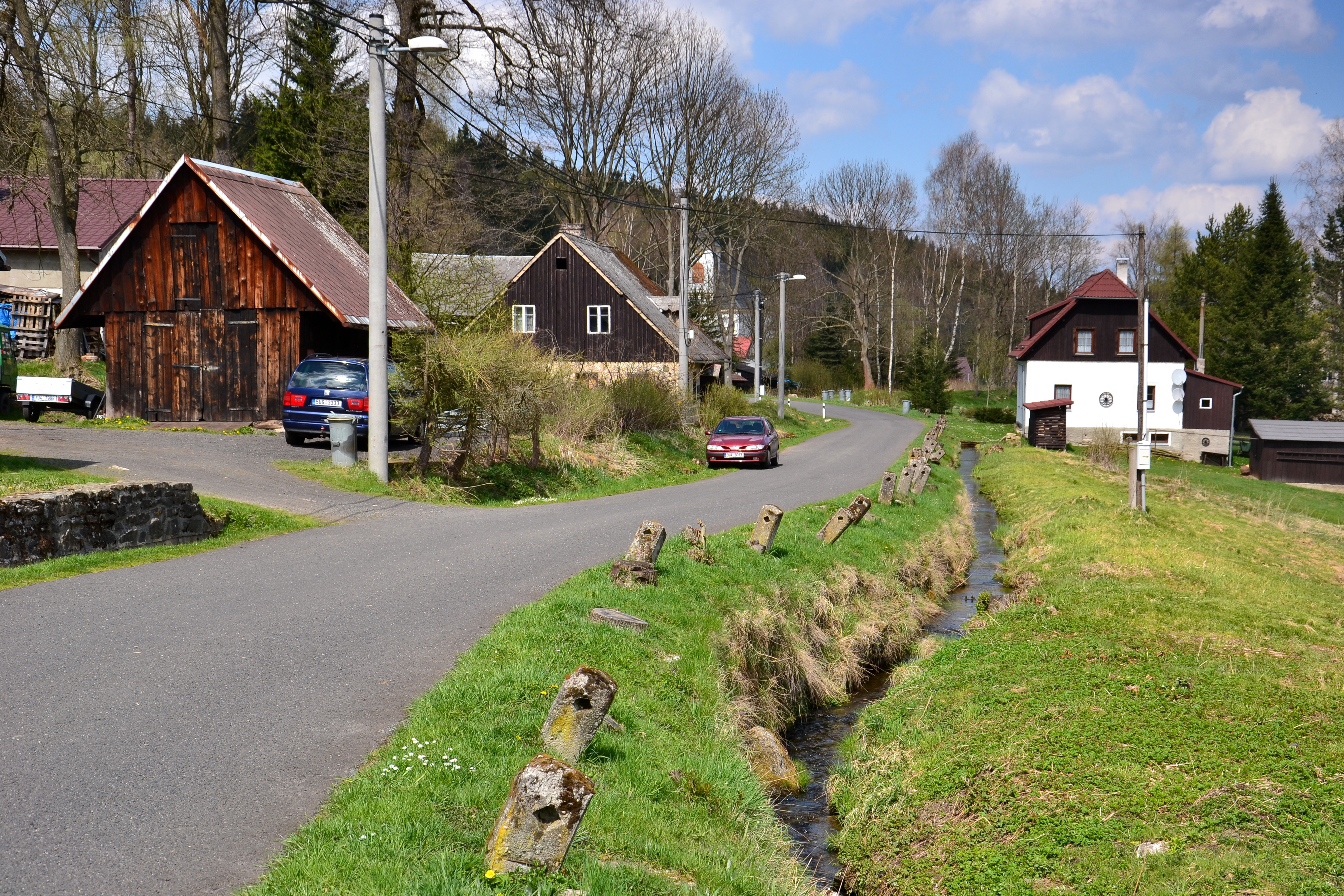 Cesta mezi návsí a kostelem